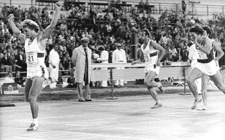 Olaf Prenzer, Lutz Jaenicke, Detlef Burdack, Jörg Pfeifer ADN-ZB Kluge -2.7.78-str-Leipzig: DDR Meisterschaften der Leichtathleten- Überraschung im 200-m-Lauf der Männer. Der 19-jährige Olaf Prenzer (l.) aus Magdeburg gewann mit der persönlichen Bestleistung von 20,89 s. Dahinter v.l.: Lutz Jaenicke (SC magdeburg) , Detlef Burdack (SC Dynamo Berlin) und Jörg Pfeifer (SC Chemie Halle) .